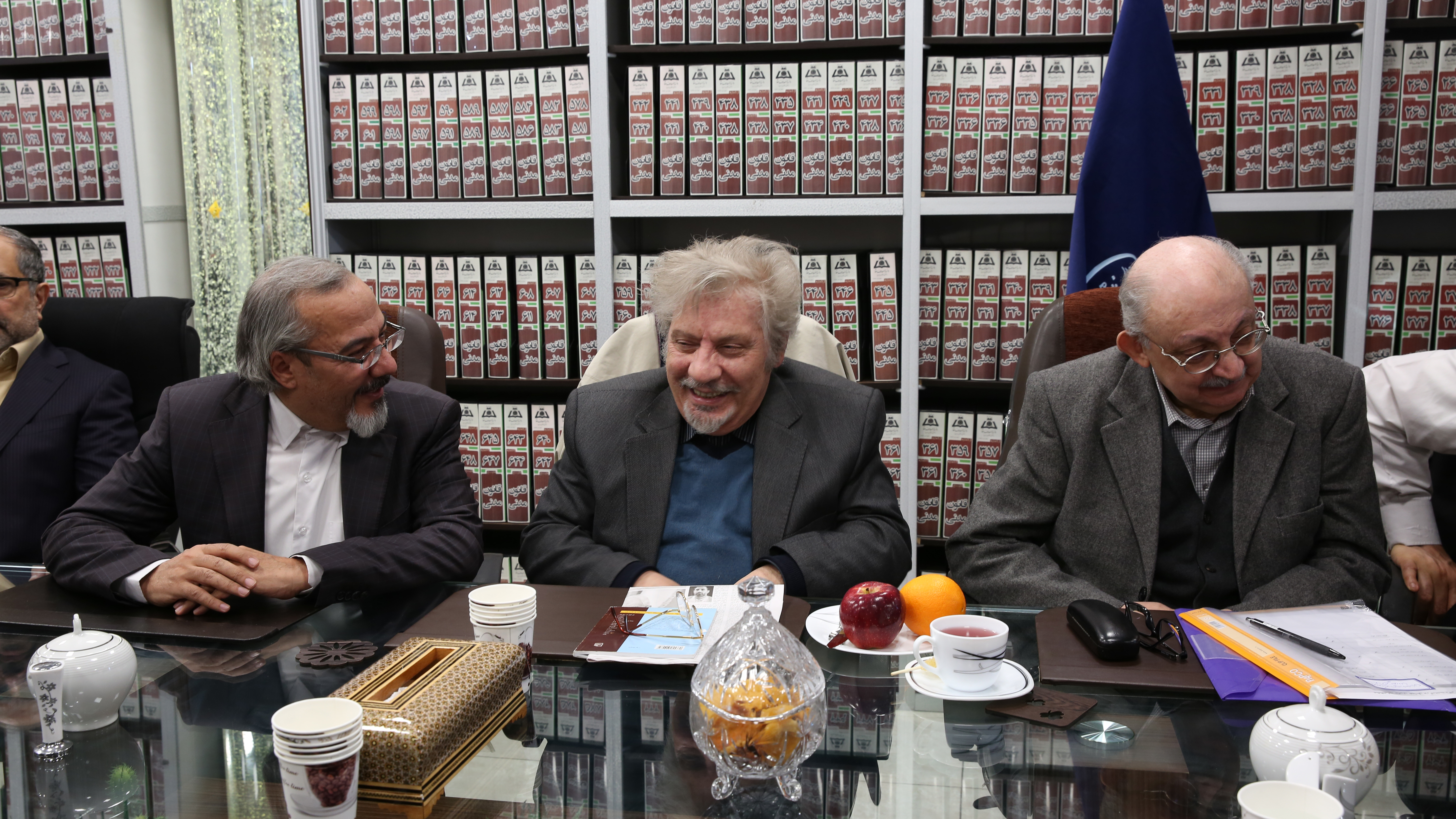 اعضای کمیته علمی همایش بزرگداشت محمدجعفر جعفری لنگرودی از راست؛ محمد رضا ضیائی بیگدلی، محسن محبی و محمد درویش زاده